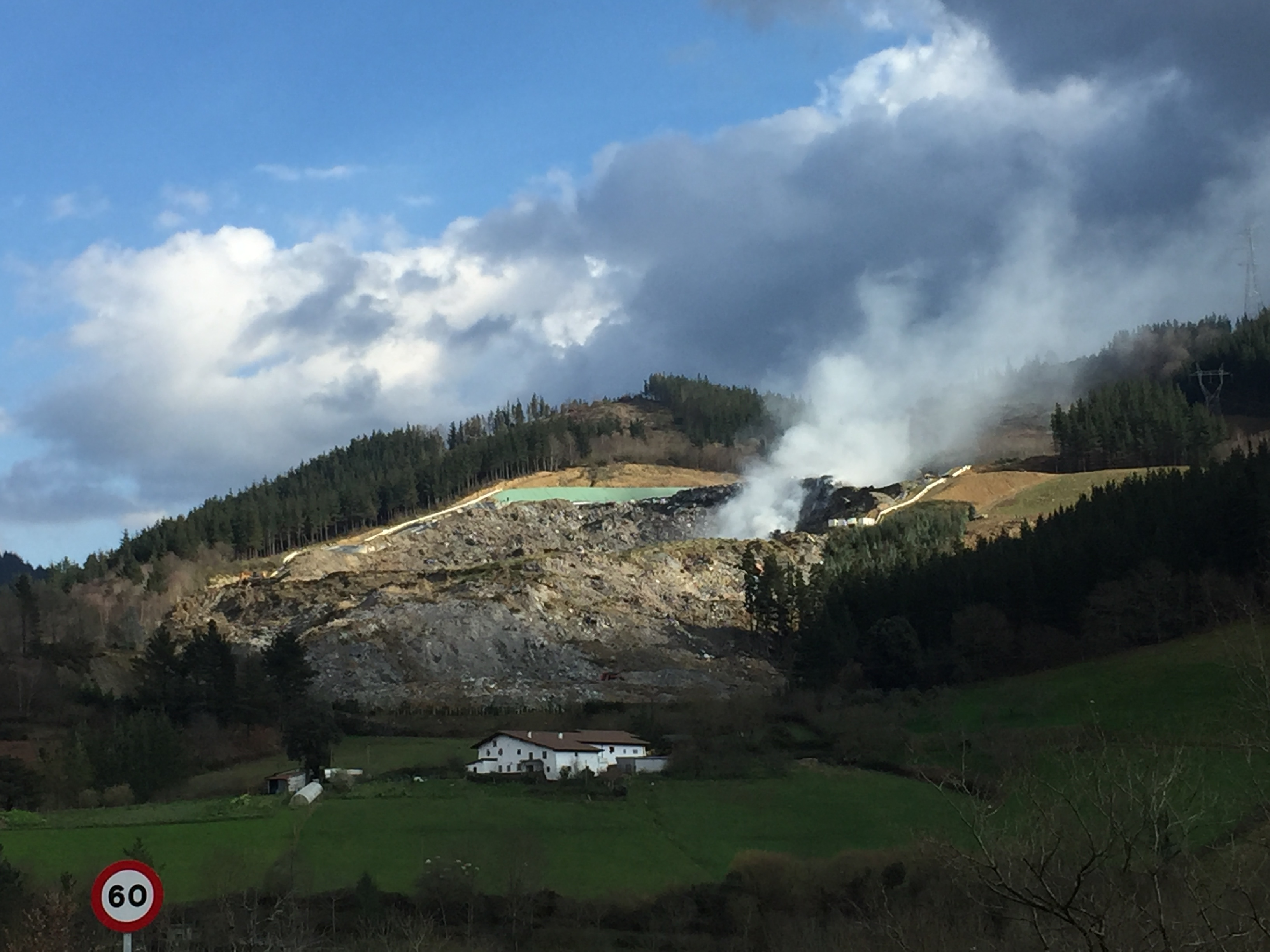 Zaldibarko zabortegiko lur-jausia